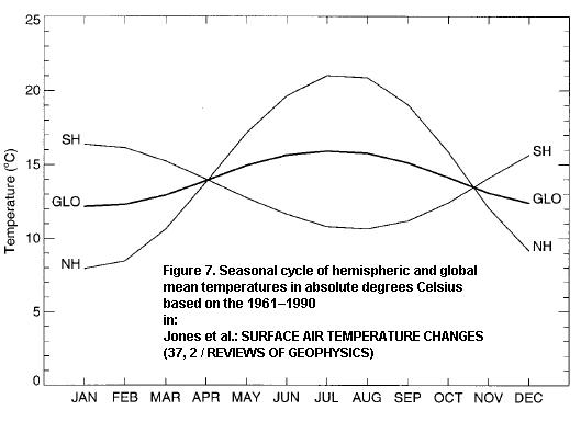 P. D. Jones et. al.: SURFACE AIR TEMPERATURE AND ITS CHANGES OVER THE PAST 150 YEARS (Seite 24 von 28 der PDF-Datei) Lufttemperatur (jahreszeitlicher Temperaturverlauf)